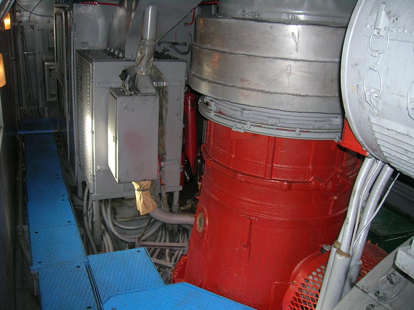 Тяговое электрооборудование и установка ЦВС тепловоза ТЭП70 Слева направо: высоковольтная камера с укреплёнными на ней ВУ и УВВ, установка ЦВС, край стартёр-генератора и в углу часть тягового генератора